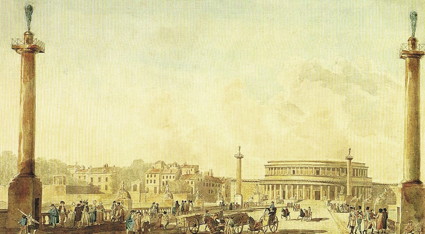 Projet pour le pont de la Concorde et la façade nord du Palais-Bourbon